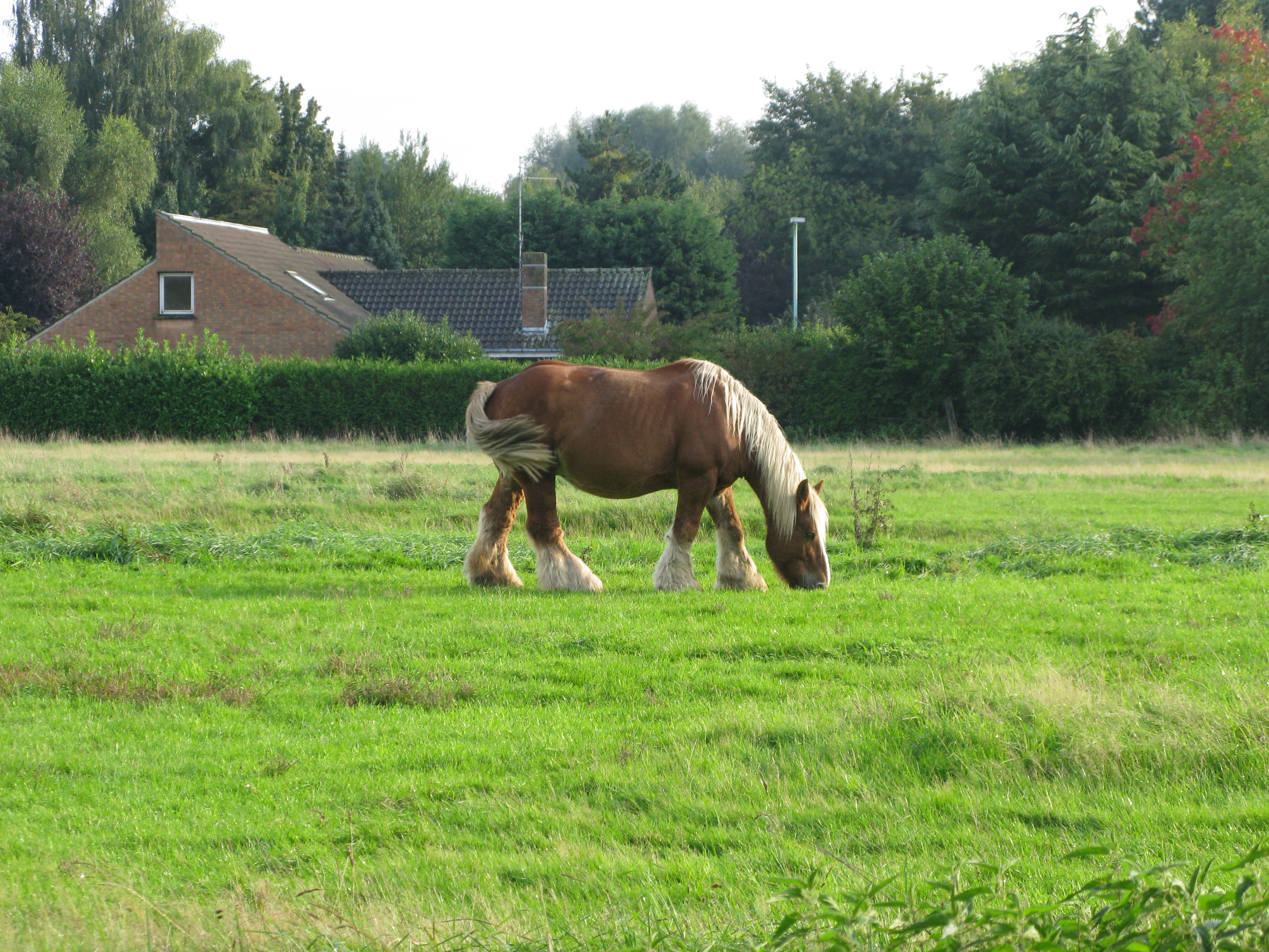 Cheval de trait (equus ferus caballus), parc du Héron, Villeneuve d'Ascq.